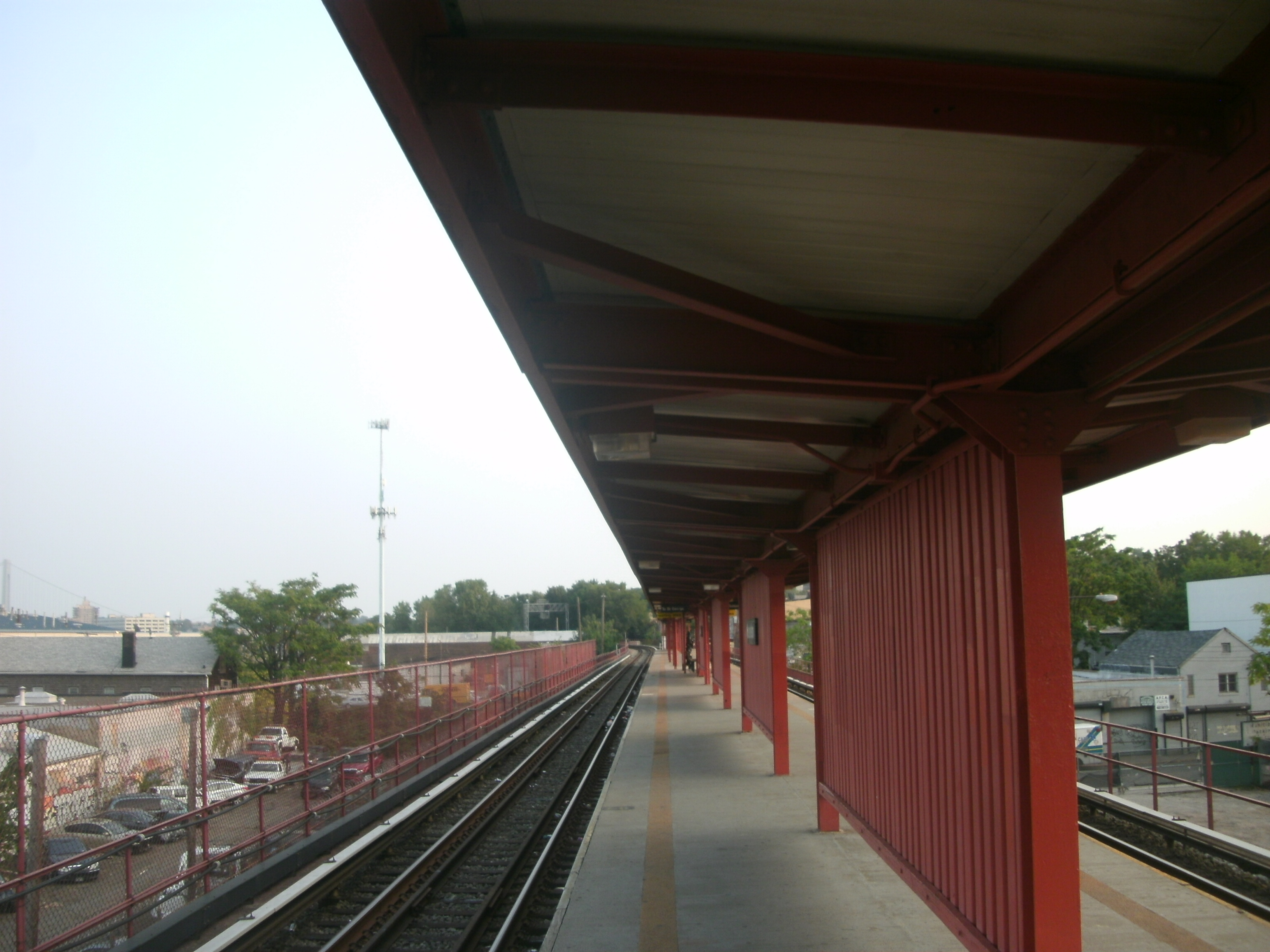 Ge digital camera